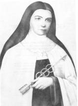 Sister Marie of St Peter